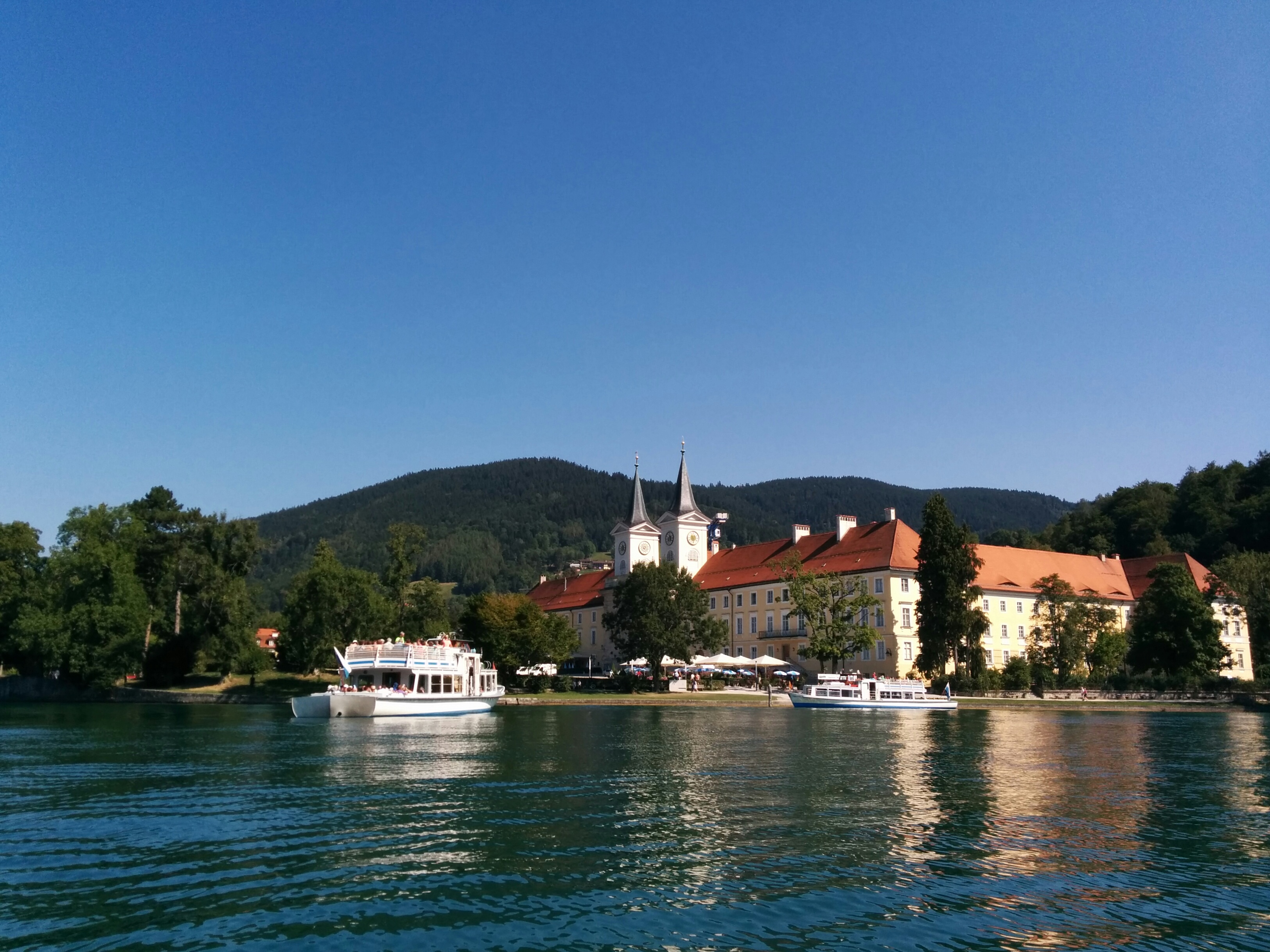 Fotografie des Klosters Tegernsee von der Sicht des Sees mit zwei Linienschiffen im Vordergrund.